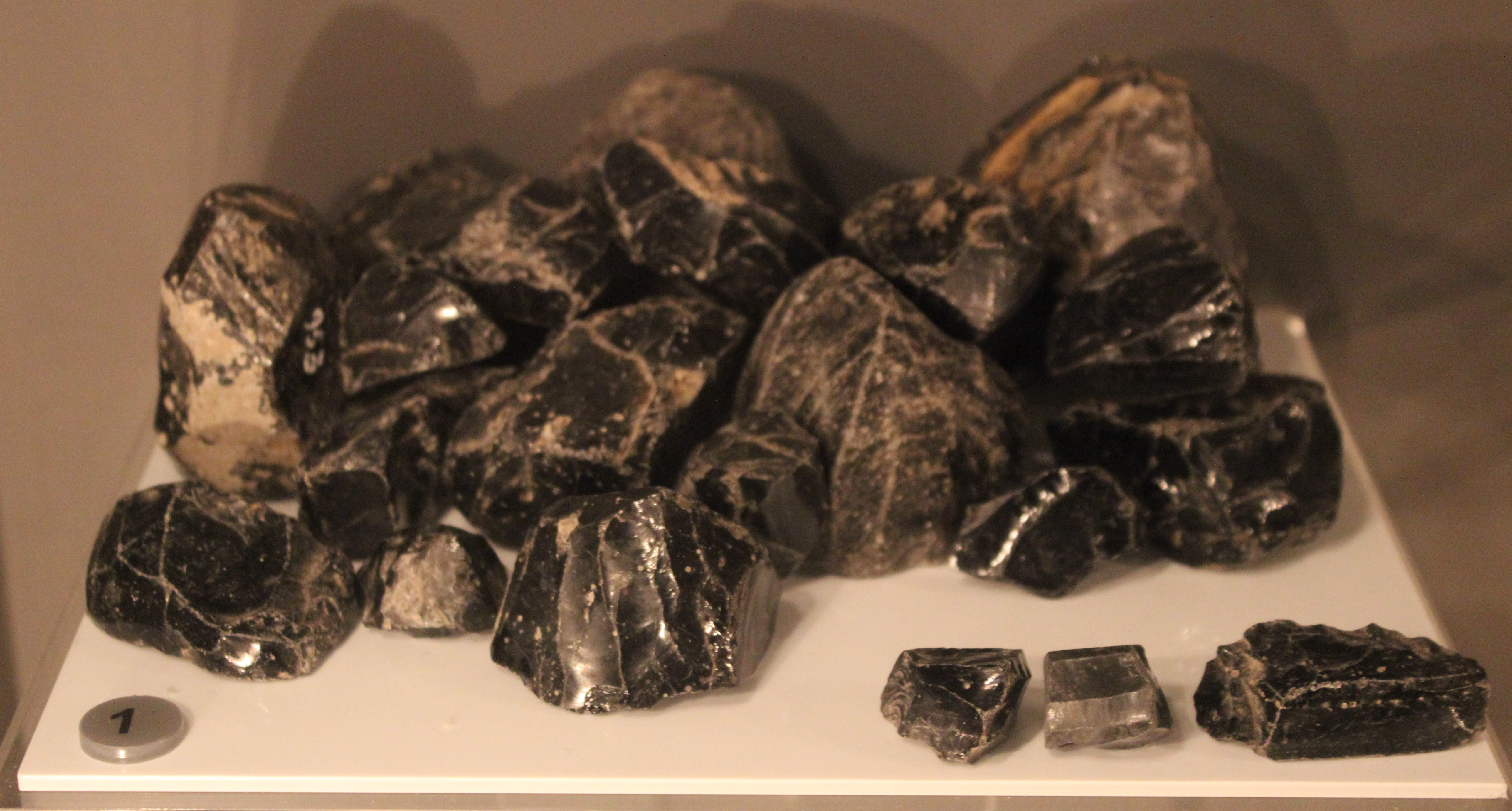 Paestum. Museo Archeologico Nazionale. Fragmentos de obsidiana, cultura del Gaudo.